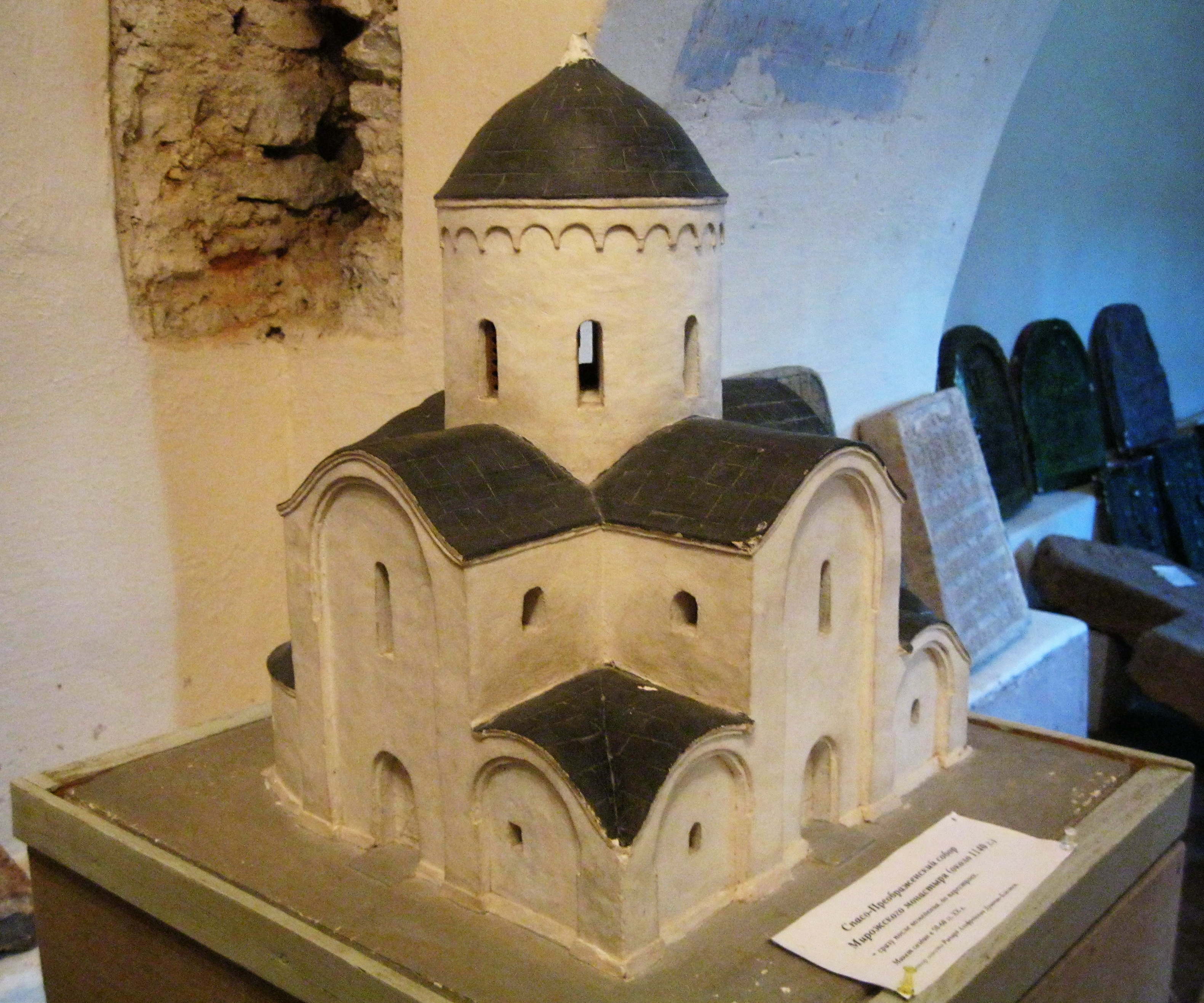 Ансамбль Спасо-Мирожского монастыря: Завеличье (Красноармейская наб., 4), Псков, Псковская область